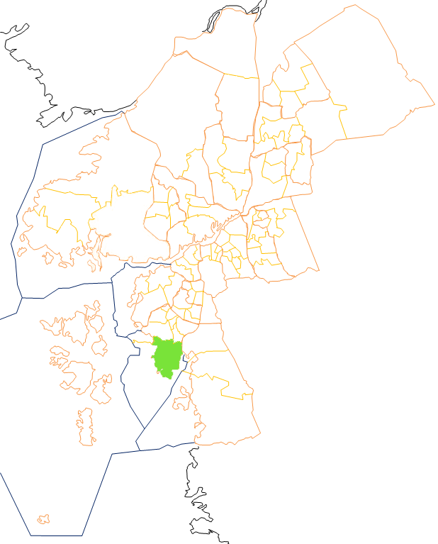 Karta som visar primärområdes belägenhet i Göteborg